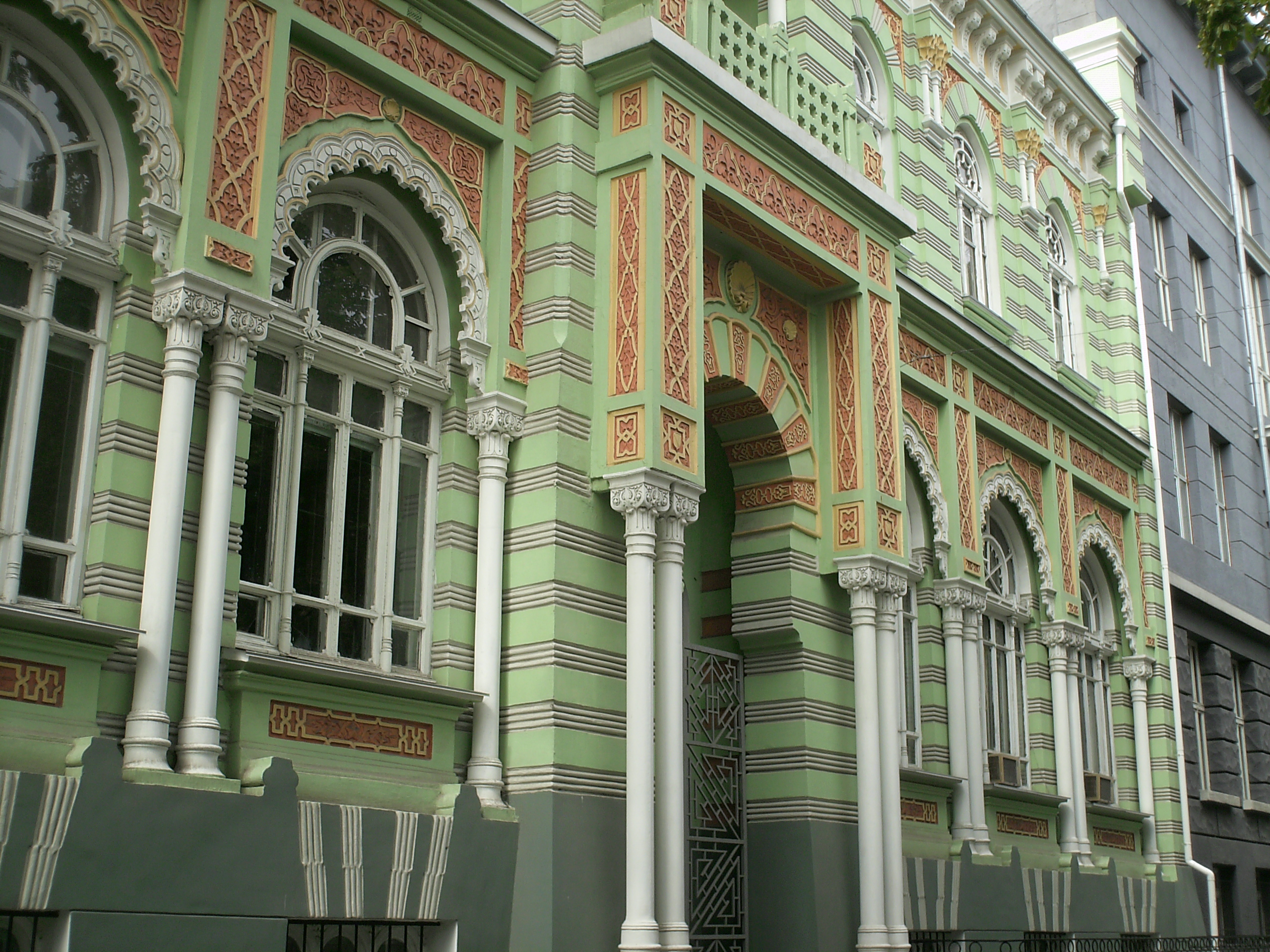 Elisavetinskaya (Schepkina) street 16, Odessa, Ukraine